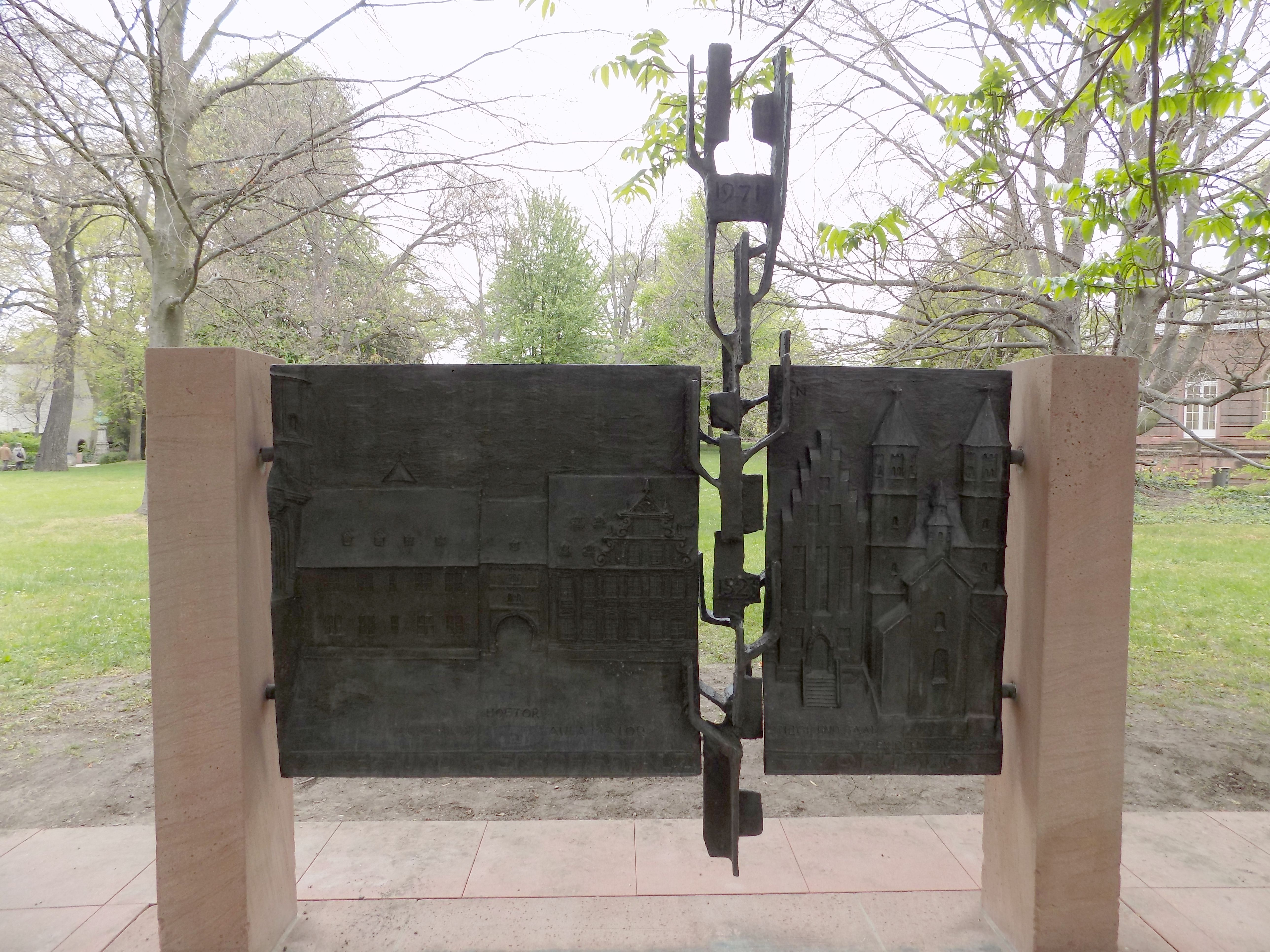 Die Großen Schuhe Luthers (Tafel Detail)